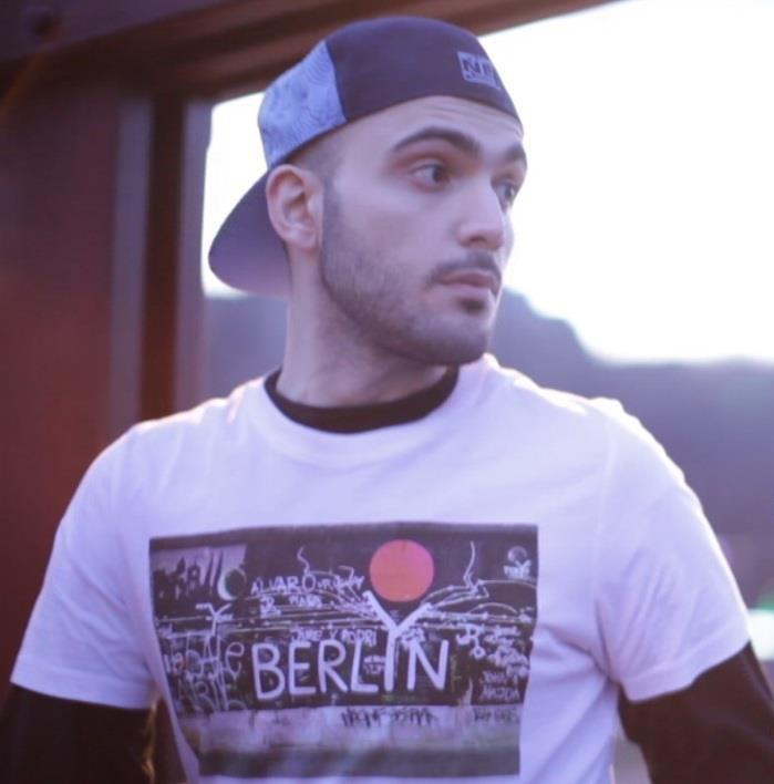 ქართველი რეპერი